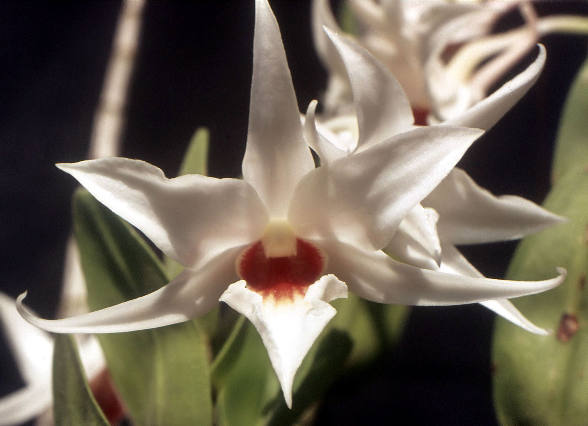 Dendrobium draconis